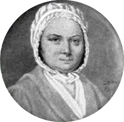 Miniature de Suzanne Catherine Marguerite Amstutz